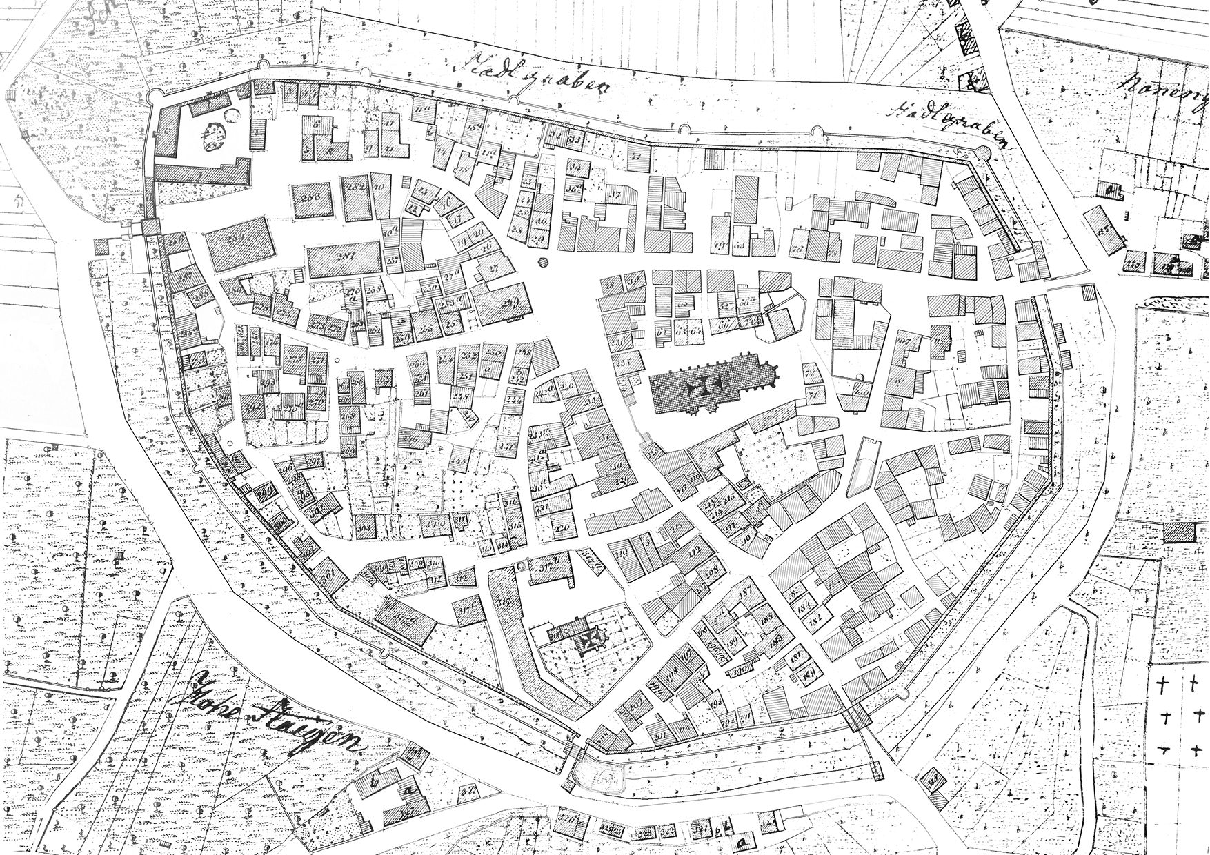 Altstadt Markgröningen vor 1831. Rekonstruiertes Composit aus der Urflurkarte, Blätter NO XXXVIII, 2+3: nachträgliche Änderungen und störende Beschriftungen gelöscht, Blattübergang angepasst, als abgerissen markierte Strukturen (auf Version von 1831/32 nicht mehr vorhanden) retuschiert, Konturen und Schraffuren teilweise nachgezogen. (Quelle: Statistisch-Topographisches Bureau des Königreichs Württemberg; Vorlage: AGD Markgröningen)